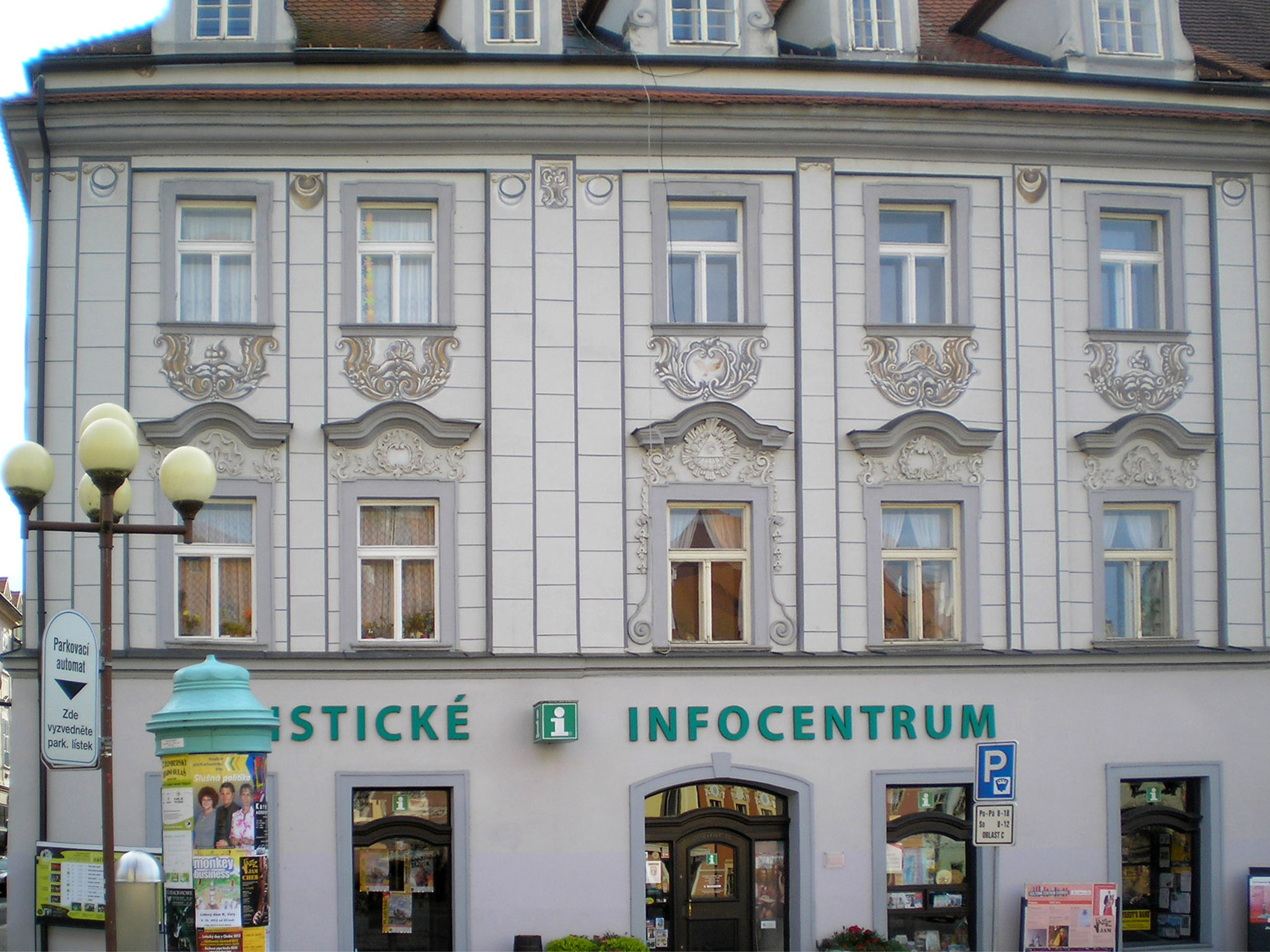 Měšťanský dům (Cheb), nám. Jiřího z Poděbrad 476/31, Cheb